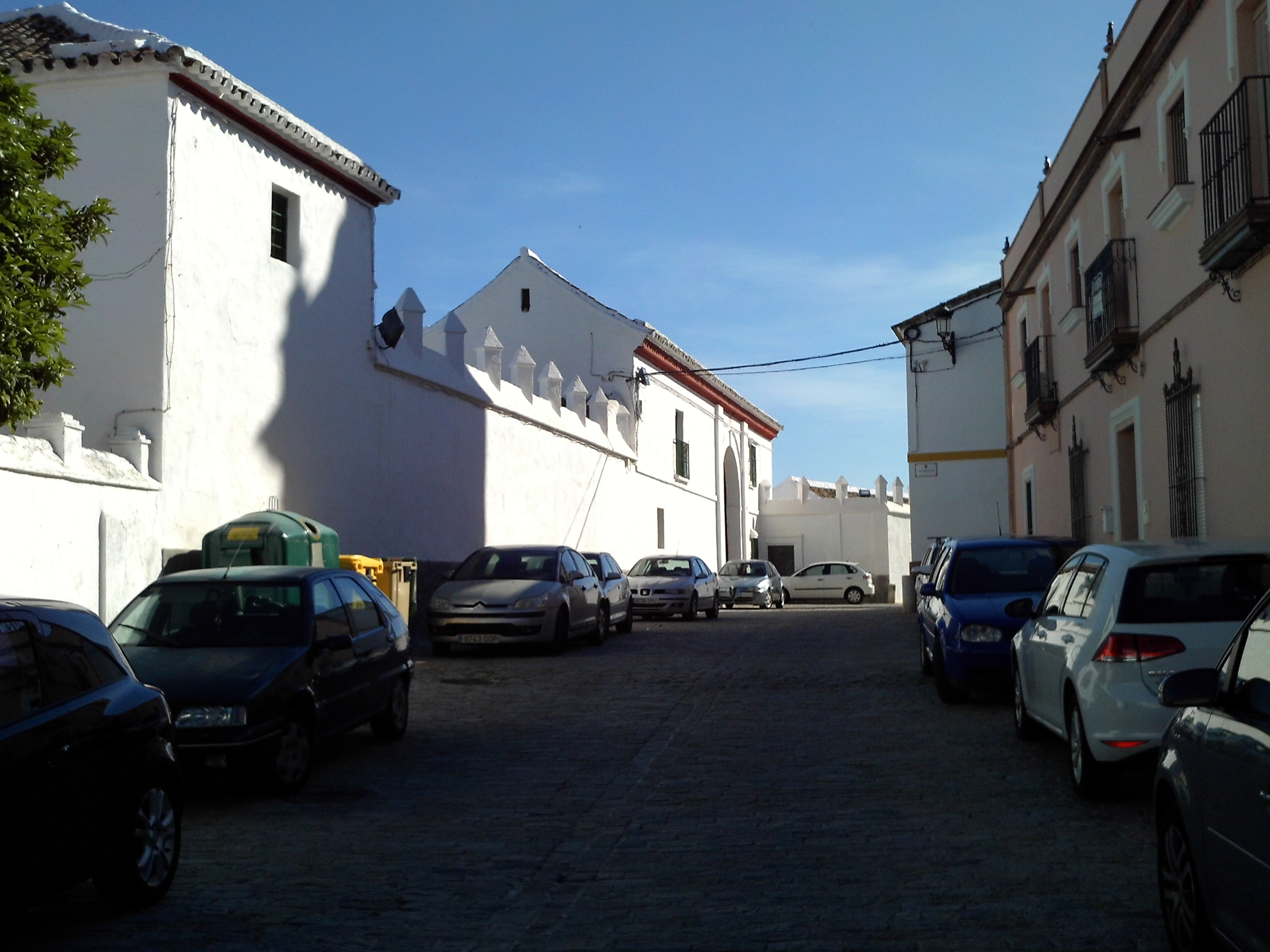 Calle de la Iglesia. A la izquierda se encuentra el Palacio, un cortijo del siglo XVII. Gerena, provincia de Sevilla, Andalucía, España.